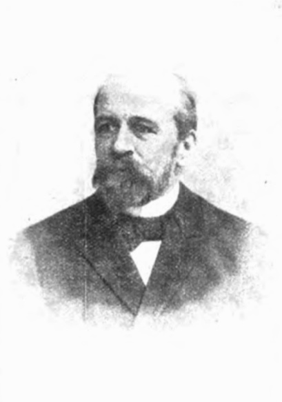 Albert Ballewski, deutscher Ingenieur, veröffentlicht am 27.3.1909